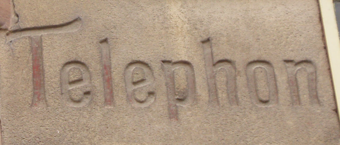 Gebäudeaufschrift von 1909